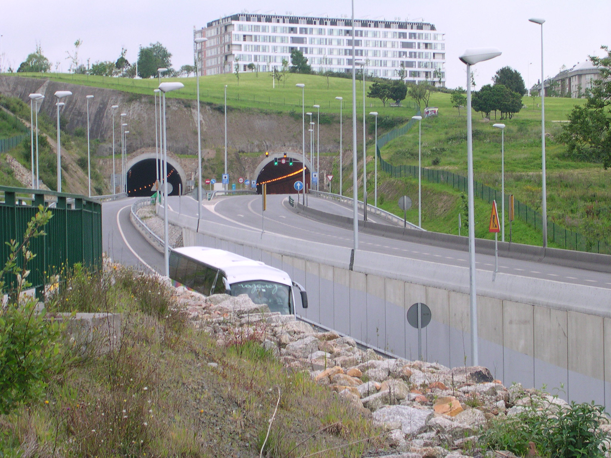 Túnel de Eirís, na autovía urbana AC-10 (A Coruña).